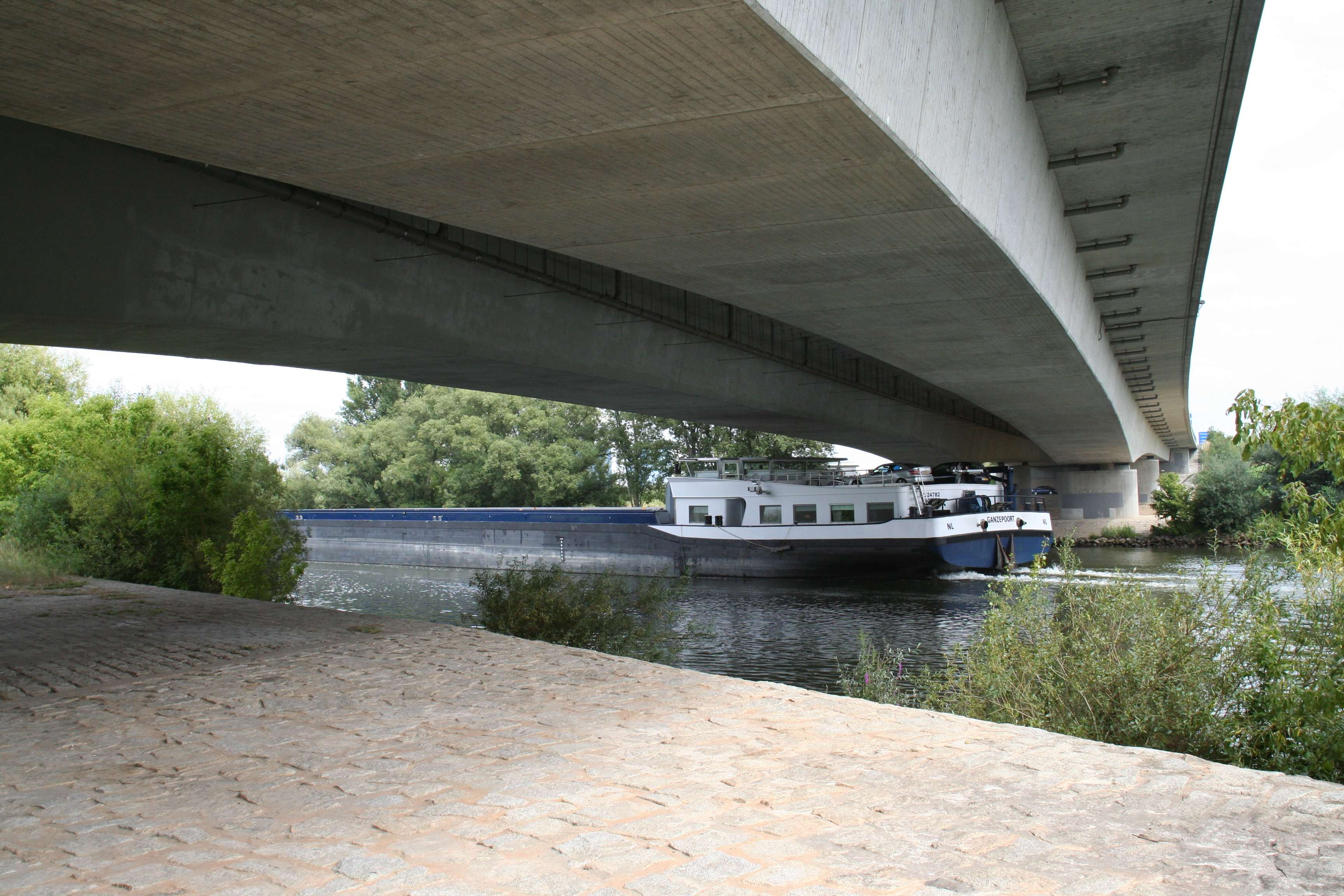 Mainbrücke Oberndorf bei Schweinfurt